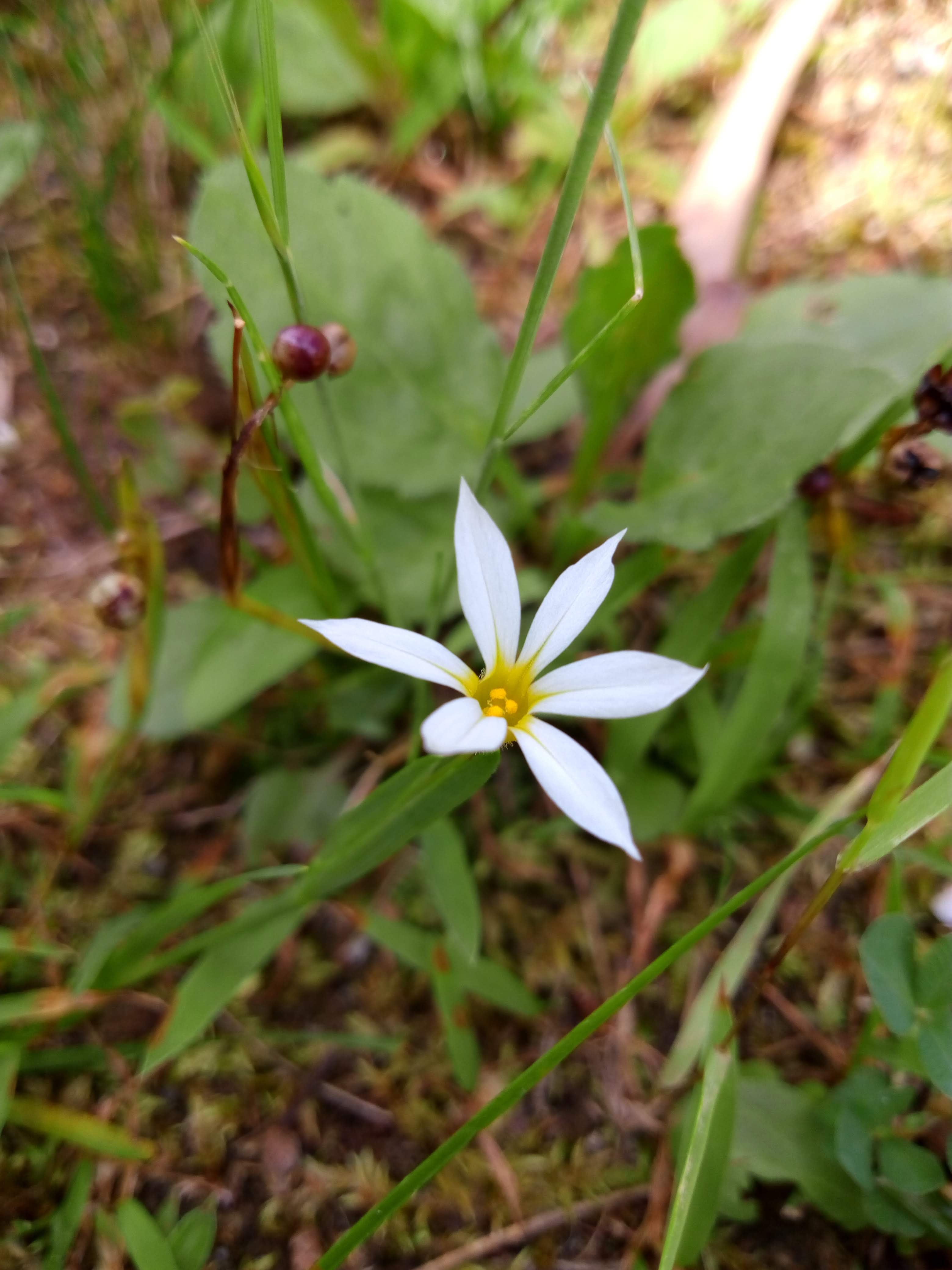 帰化植物のセッカニワゼキショウ。京都府木津川市にて撮影。